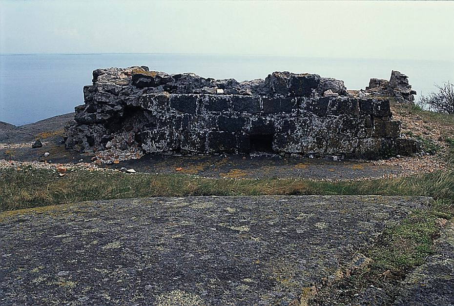 Ruiner etter den gamle fyrstasjonen på Store Færder